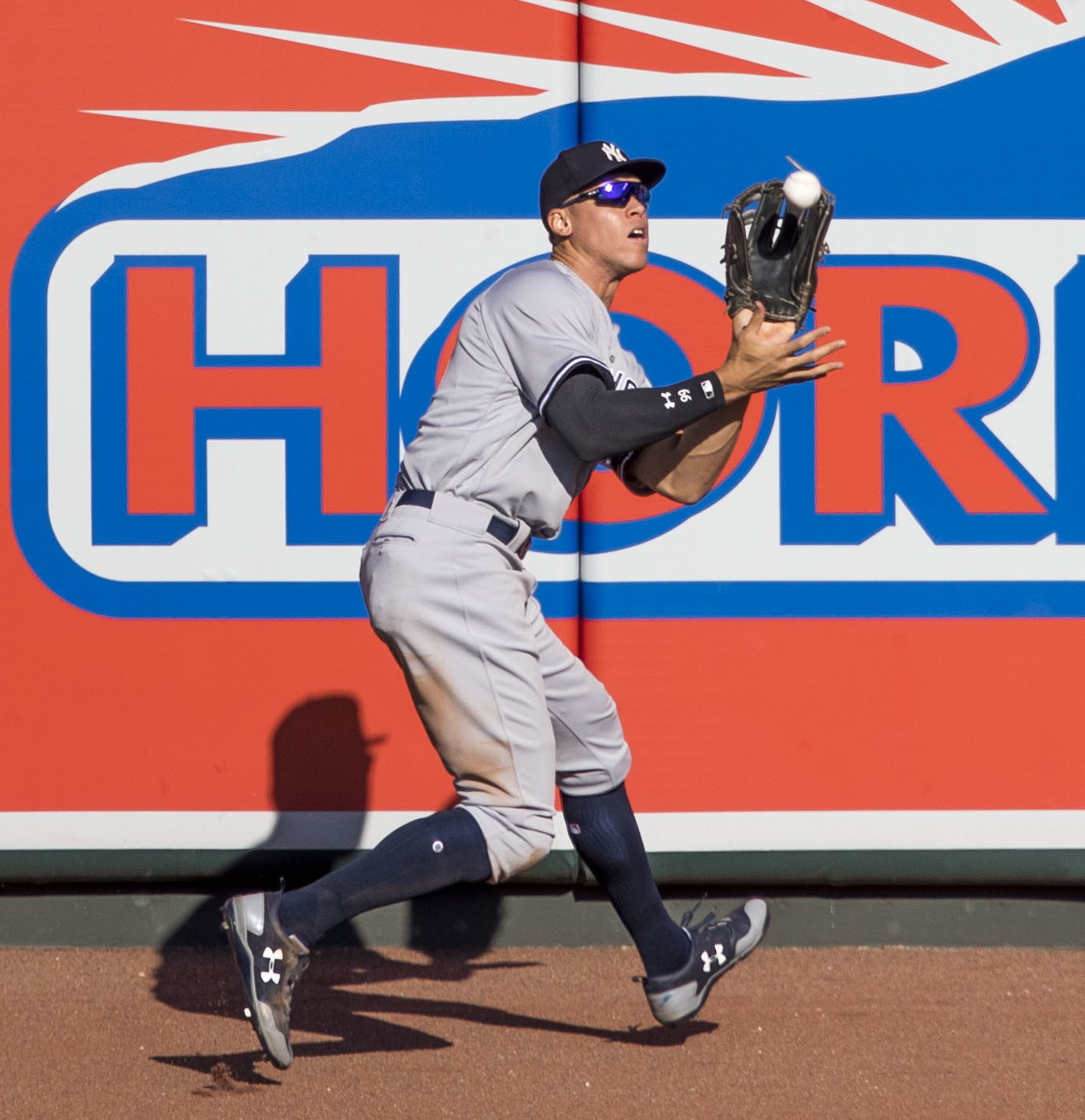 Yankees at Orioles 9/7/17